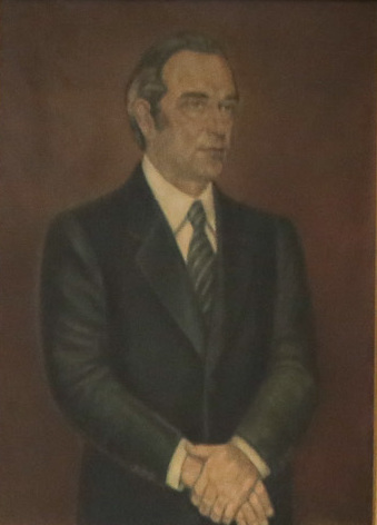 Galeria de Presidentes del Congreso de Ecuador